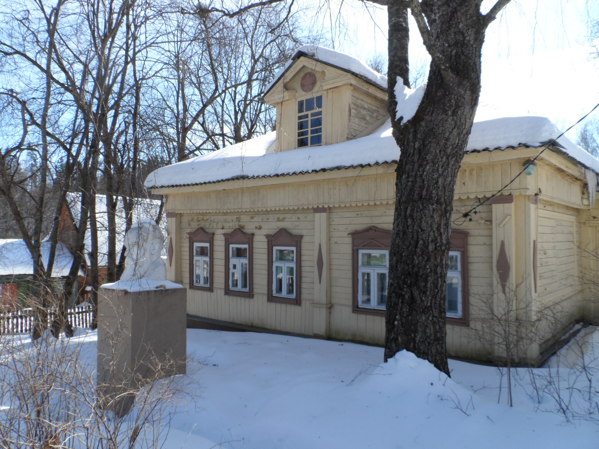 Дом композитора С. И. Танеева в деревне Дютьково в окрестностях Звенигорода